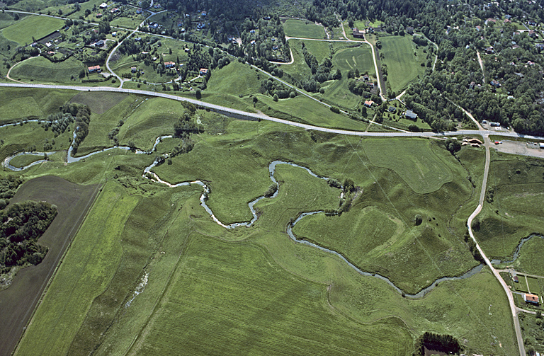 Betesgången. Motiv: Lärjeån Nyckelord: Flygbilder, Riksintressen Kategori: Dalgångsbygd Betesgången.